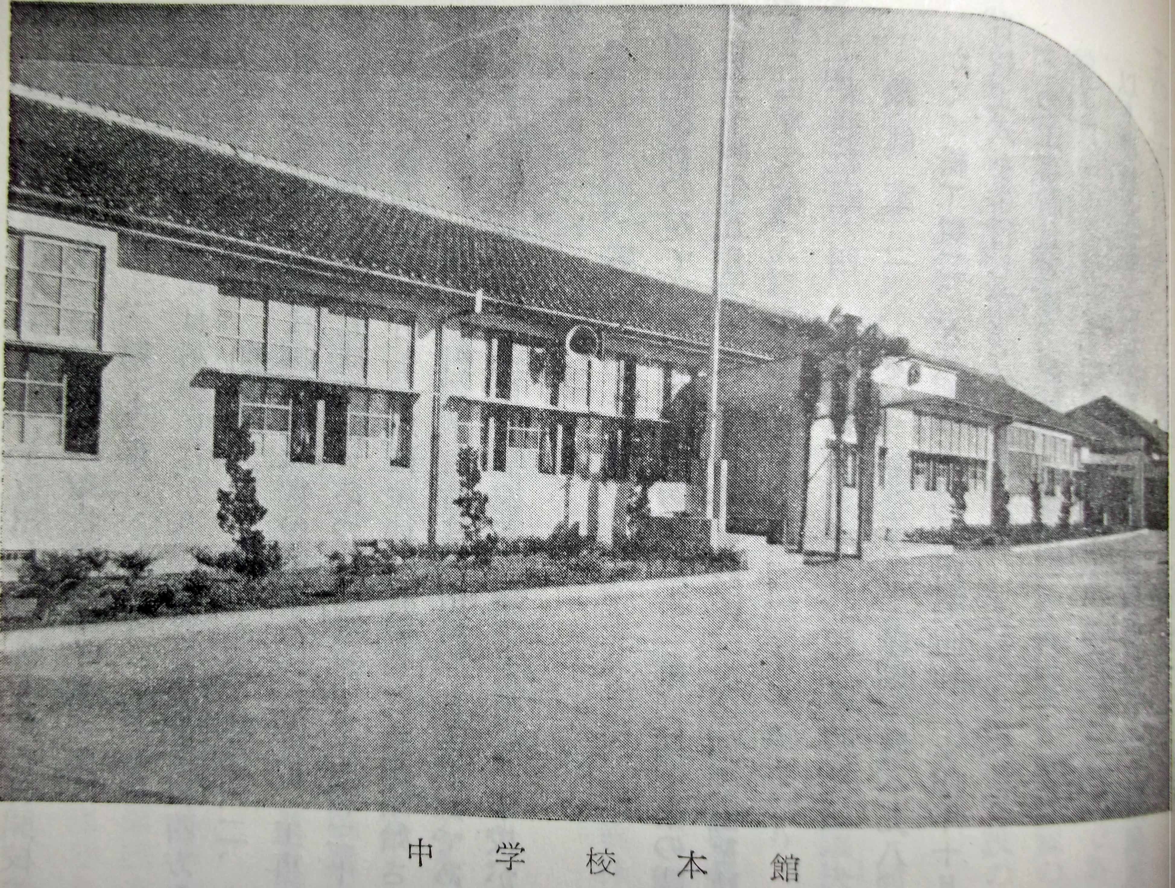 愛知県西春日井郡楠村（現名古屋市北区）の楠村立楠中学校校舎